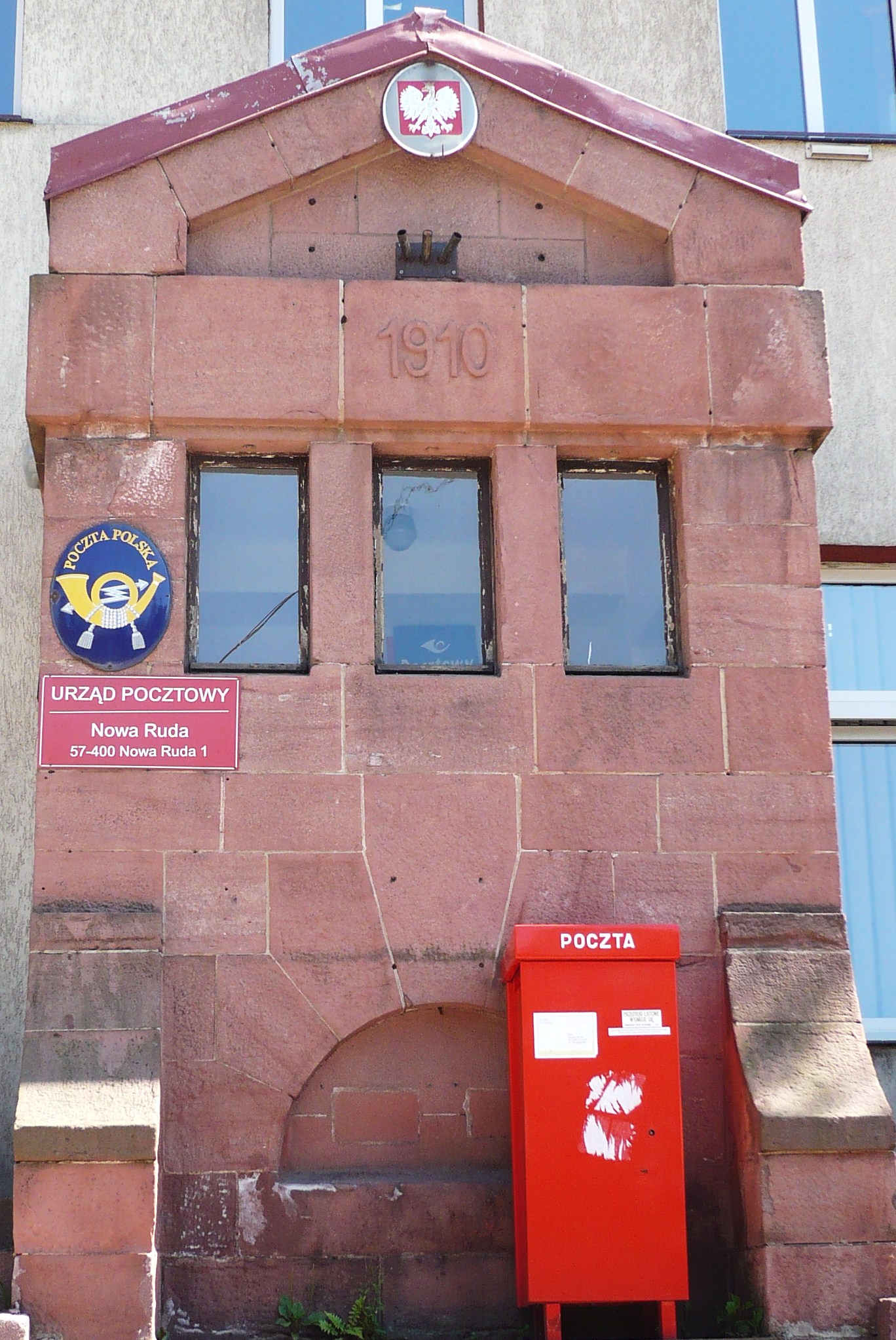 Nowa Ruda, ul. Niepodległości 1 - poczta, 1910